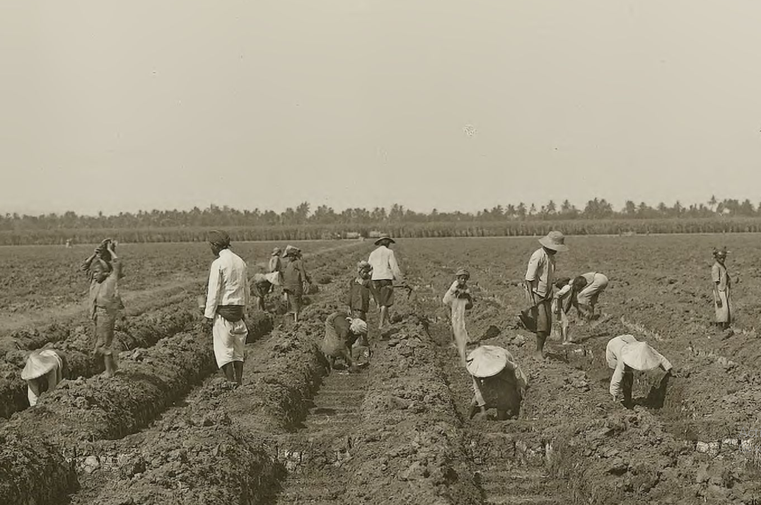 Situasi Masyarakat industri di Pabrik Gula Cepiring di Kebun Tebu